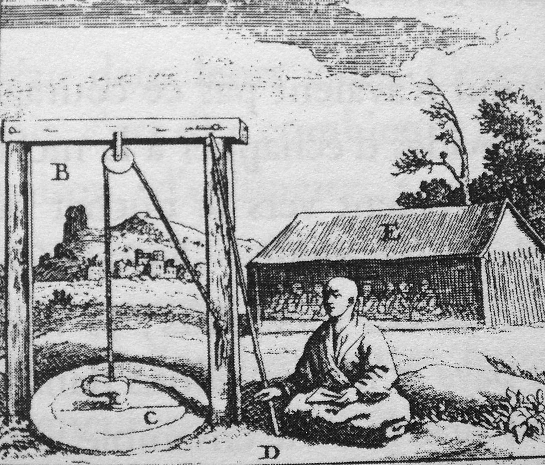 Tsurushi technique in Japan